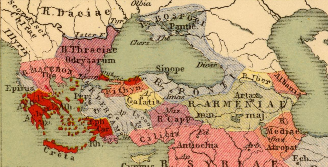 Rencna Craecorum, medio II° a,chr. saeeulo. Imperia Persarum et Macedonum. (with) Regna Diadochorum medio IIIo. a. Chr. saeculo. (with) Regna Graecorum IIo a. Chr. saeculo. Auctore Henrico Kiepert Berolinensi. Geographische Verlagshandlung Dietrich Reimer (Ernst Vohsen) Berlin, Wilhemlstr. 29. (1903)